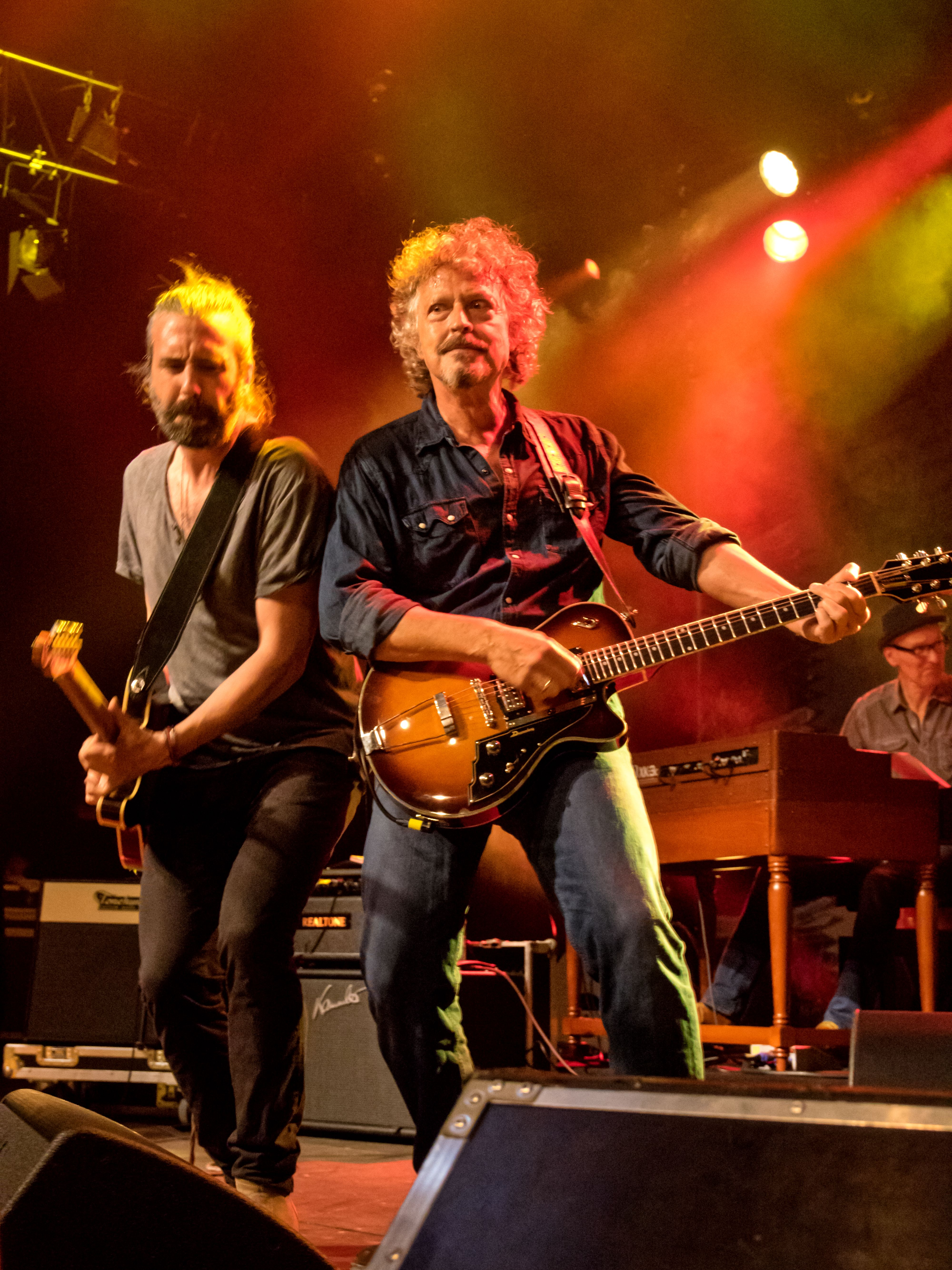 Bilder vom Zelt Musik Festival 2016 in Freiburg im Breisgau " Wolfgang Niedecken’s BAP" kurz BAP